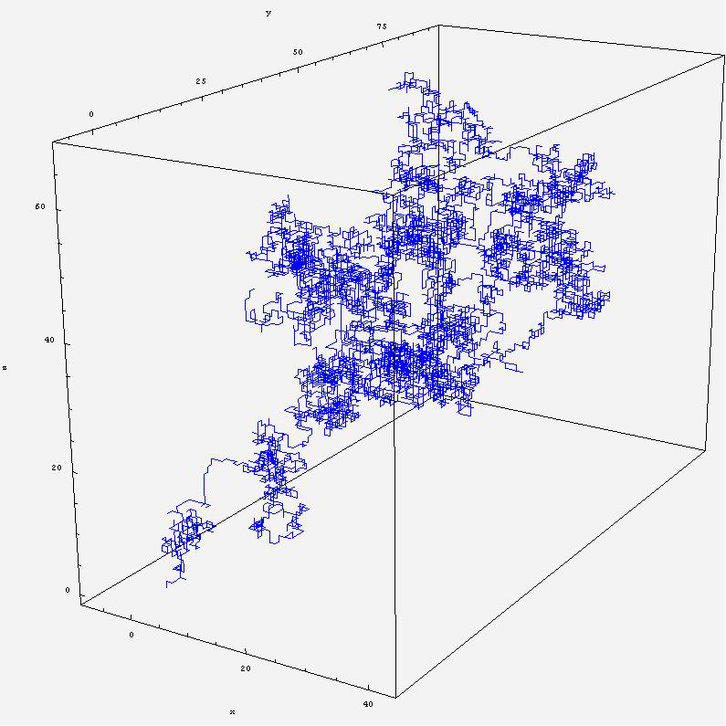 Marche aléatoire sur réseau cubique tridimensionnel ; 10 000 sauts Random walk on a cubic 3d lattice ; 10 000 steps